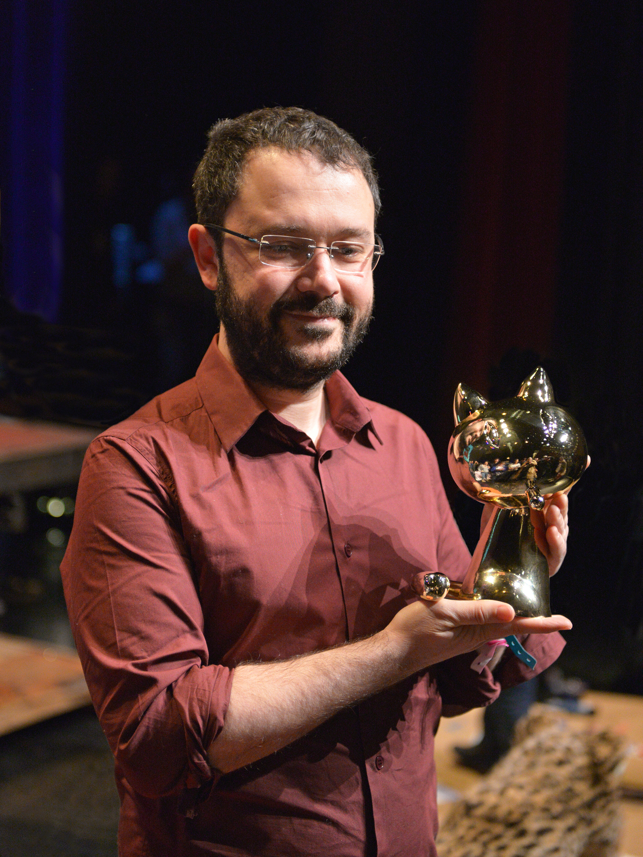 Riad Sattouf avec le Fauve d'or du meilleur album pour L'arabe du futur, après la cérémonie de remise des prix du Festival d'Angoulême 2015.